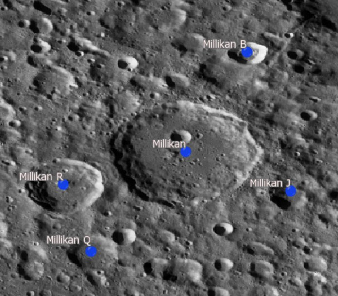 Cráter lunar Millikan. Cráteres satélite. (Imagen LRO)